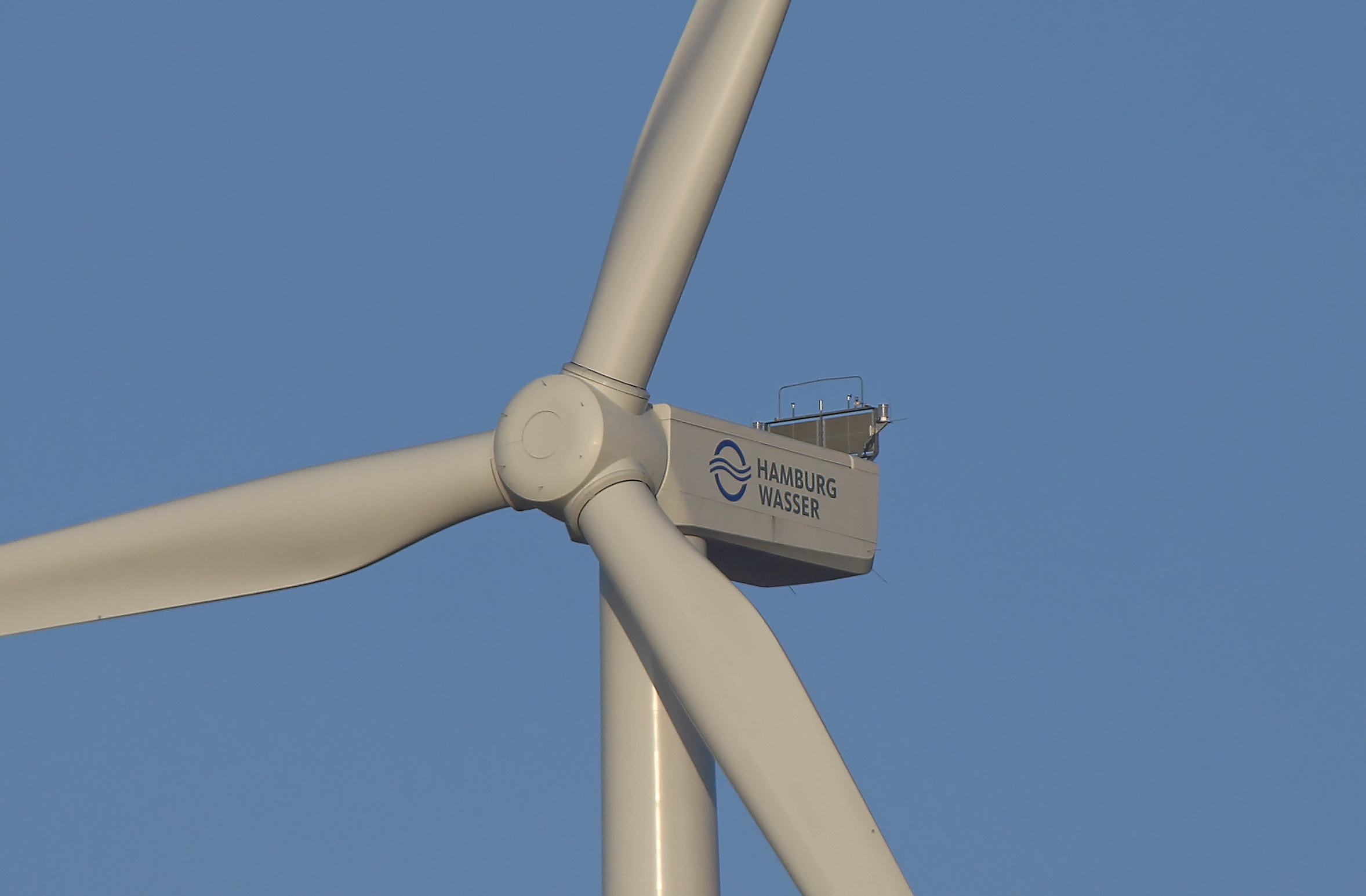 Windturbine des Typs Nordex N117/3000 auf 141-m-Hybridturm auf dem Gelände von Hamburg Wasser in Steinwerder, Gondel